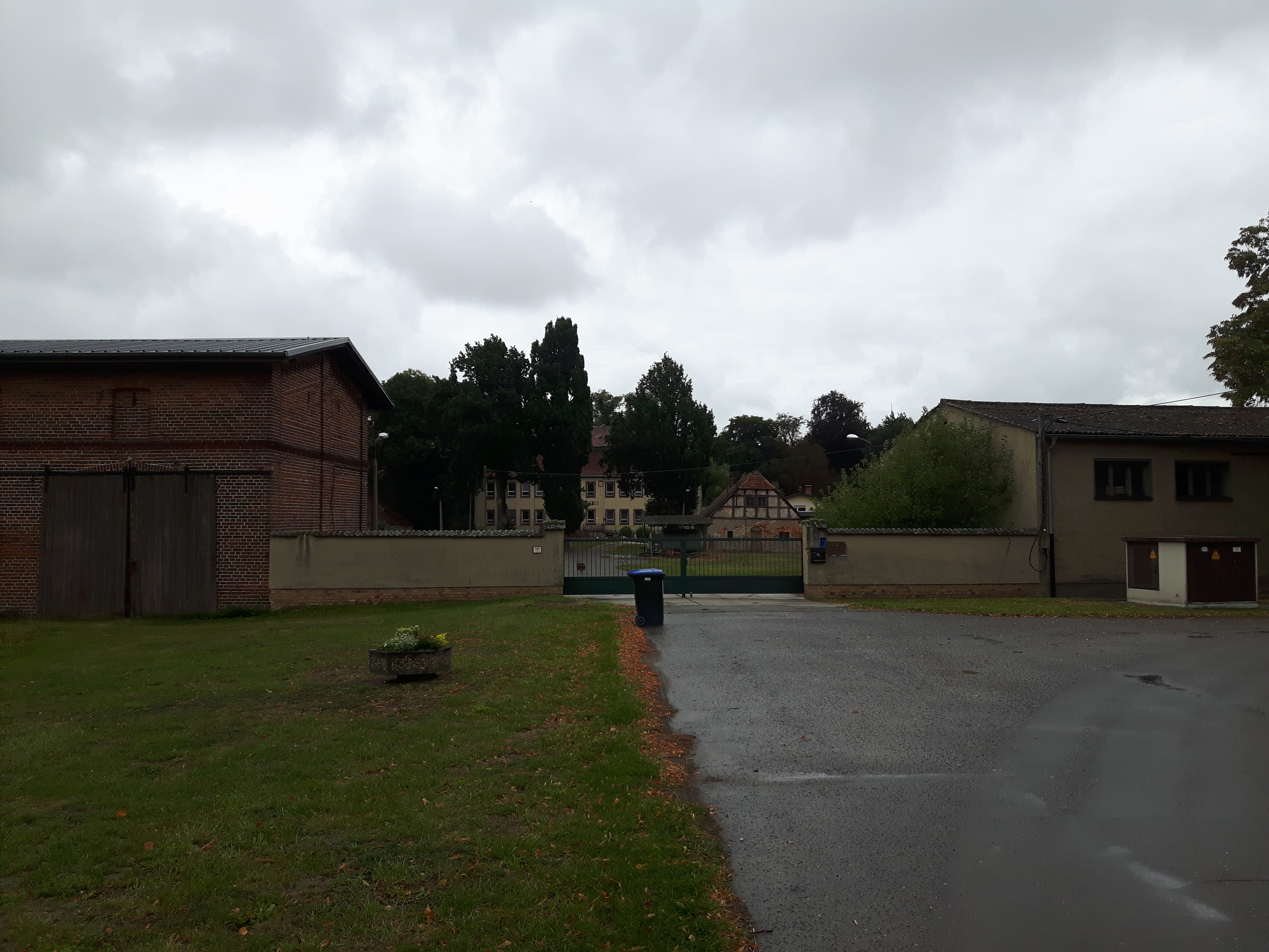 Gutshof und Gutshaus in Reuden, einem Dorf bei Calau im Landkreis Oberspreewald-Lausitz in Brandenburg.